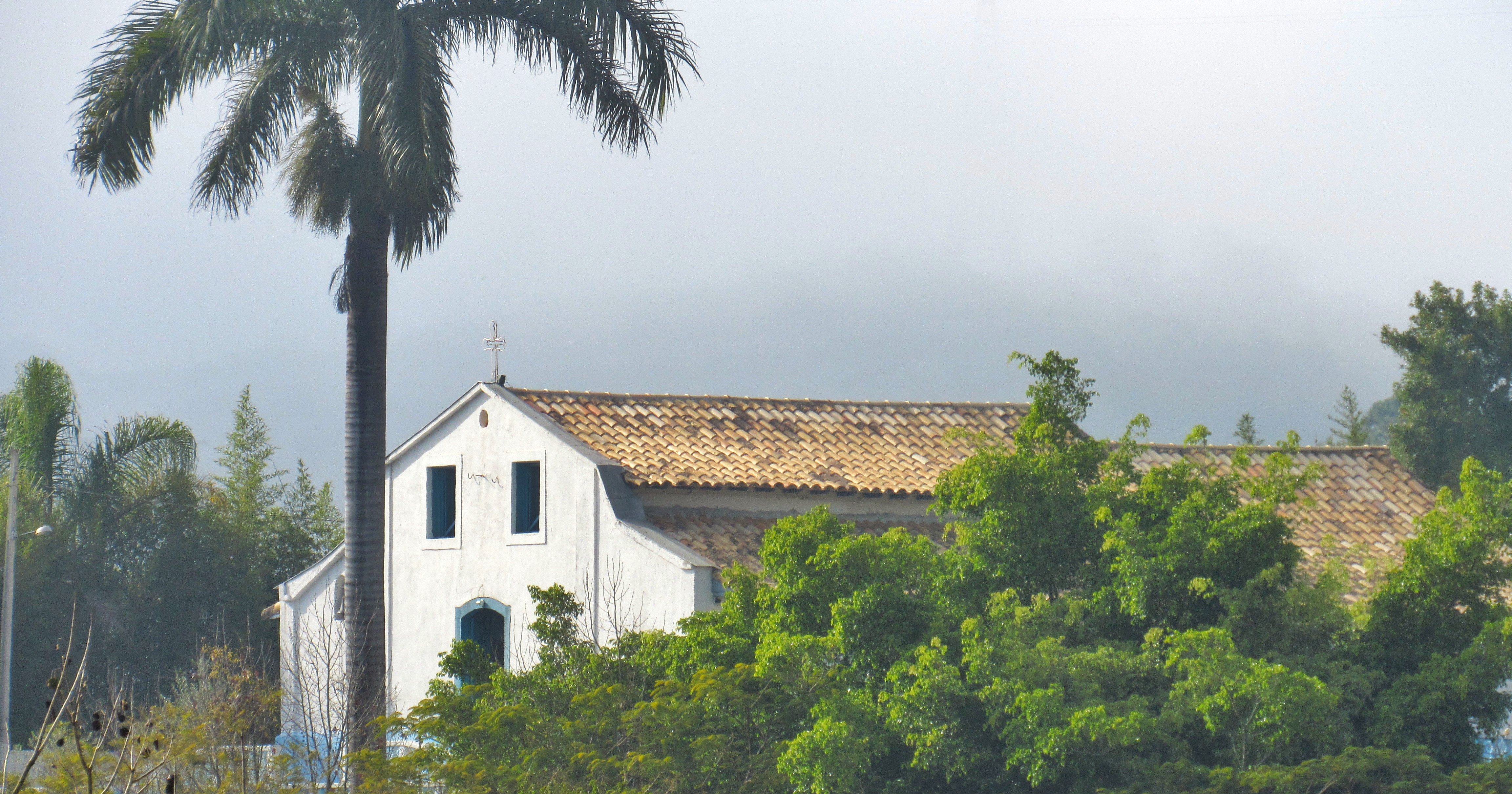 CAPELA NOSSA SENHORA DA AJUDA E SEUS PERTENCES